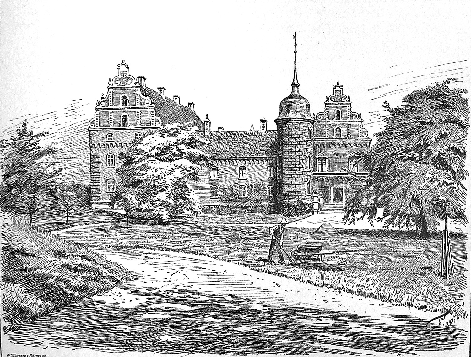 Arreskov er en gammel hovedgård, som nævnes første gang i 1210. Det er nu det tredie Arreskov, vi ser idag. Det nye voldsted er anlagt i 1558. Gården ligger i Øster Hæsinge Sogn, Sallinge Herred, Faaborg Kommune.